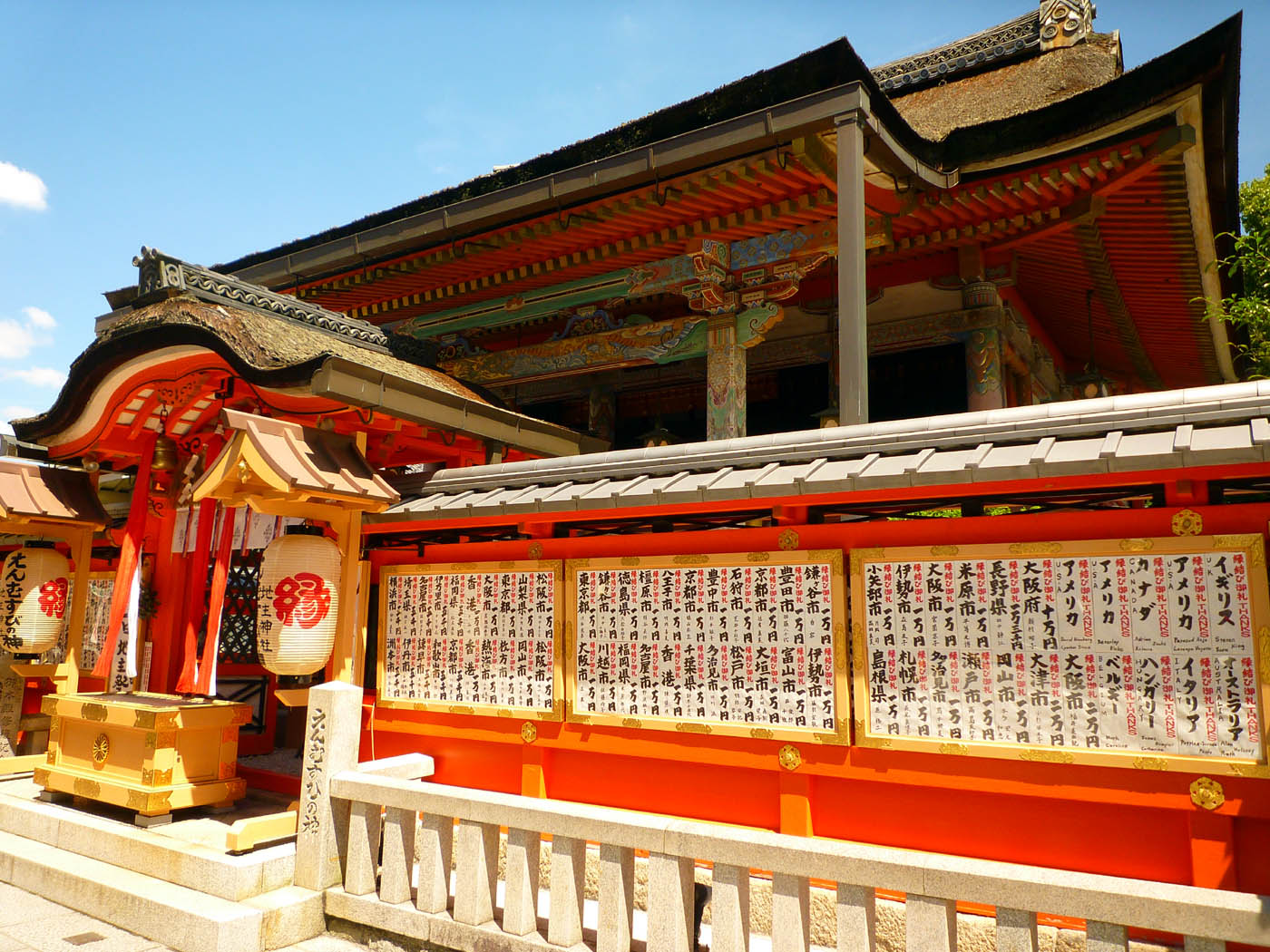 Kiyomizu-dera temple at Kyoto